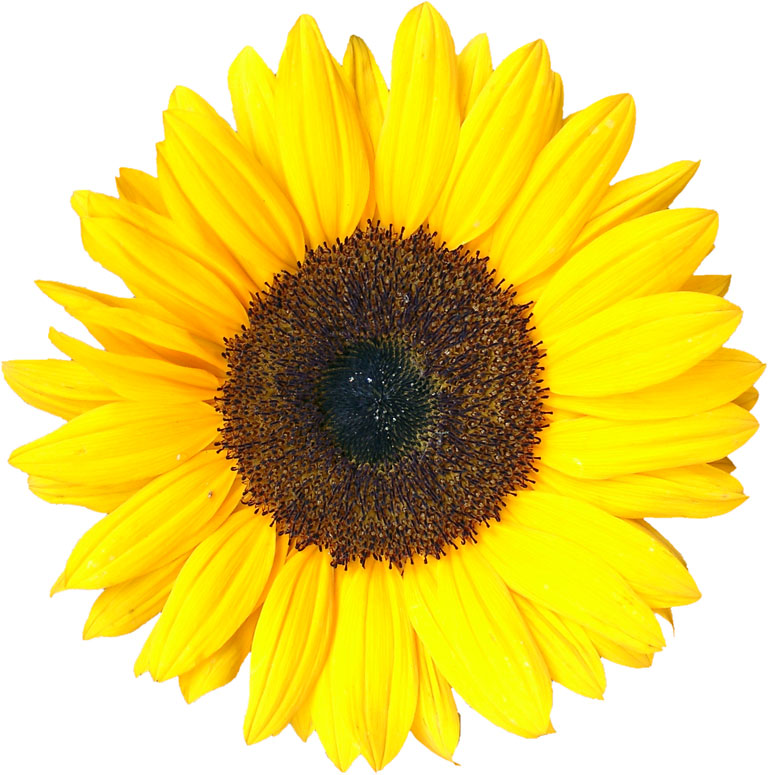 Sonnenblume (Helianthus annuus ?)